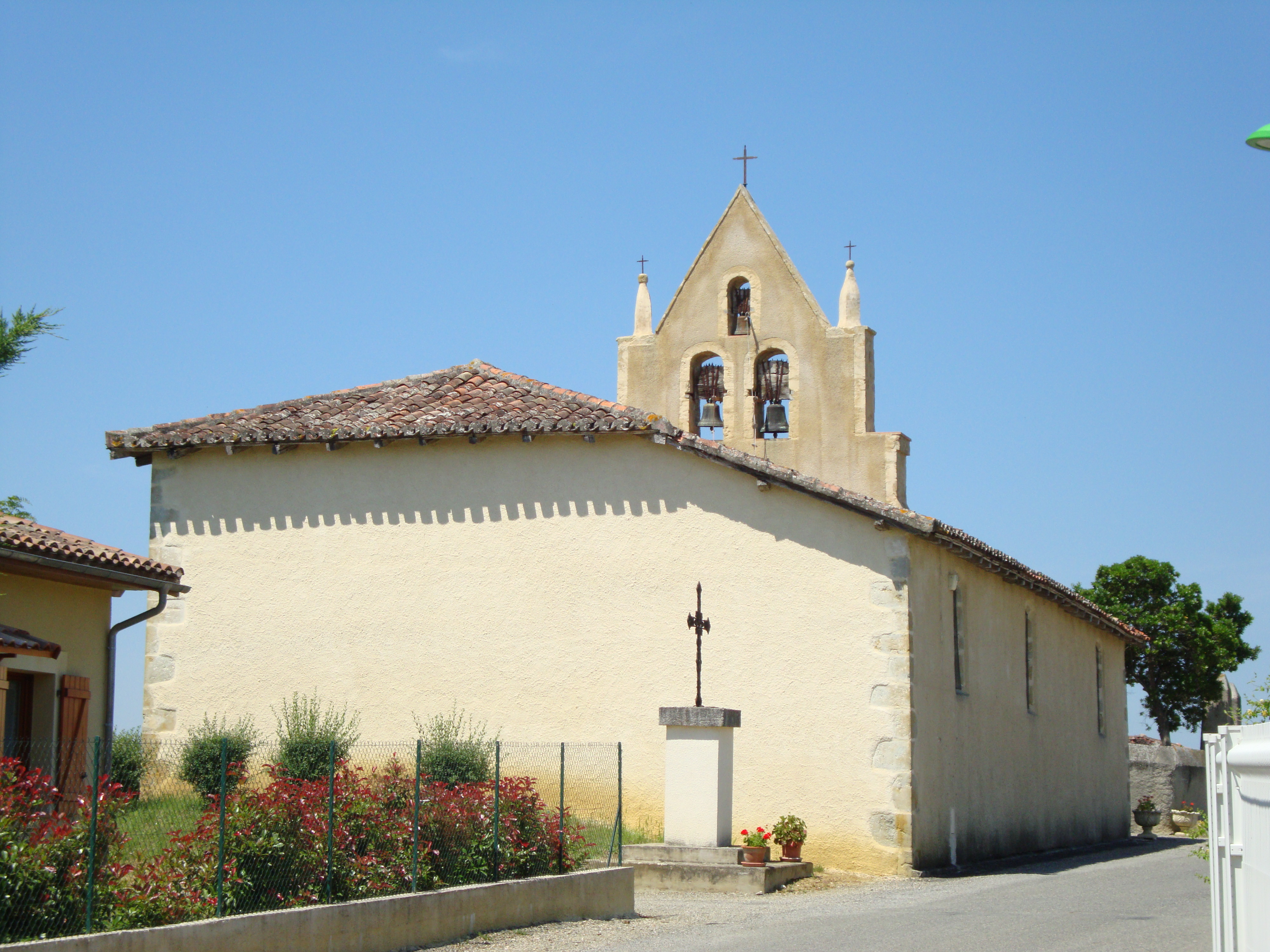 Juilles (Gers, Fr) église et croix